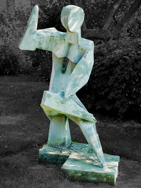 Bergkamen Museumsplatz Skulptur von Prof. Lothar Kampmann in Bergkamen/Germany